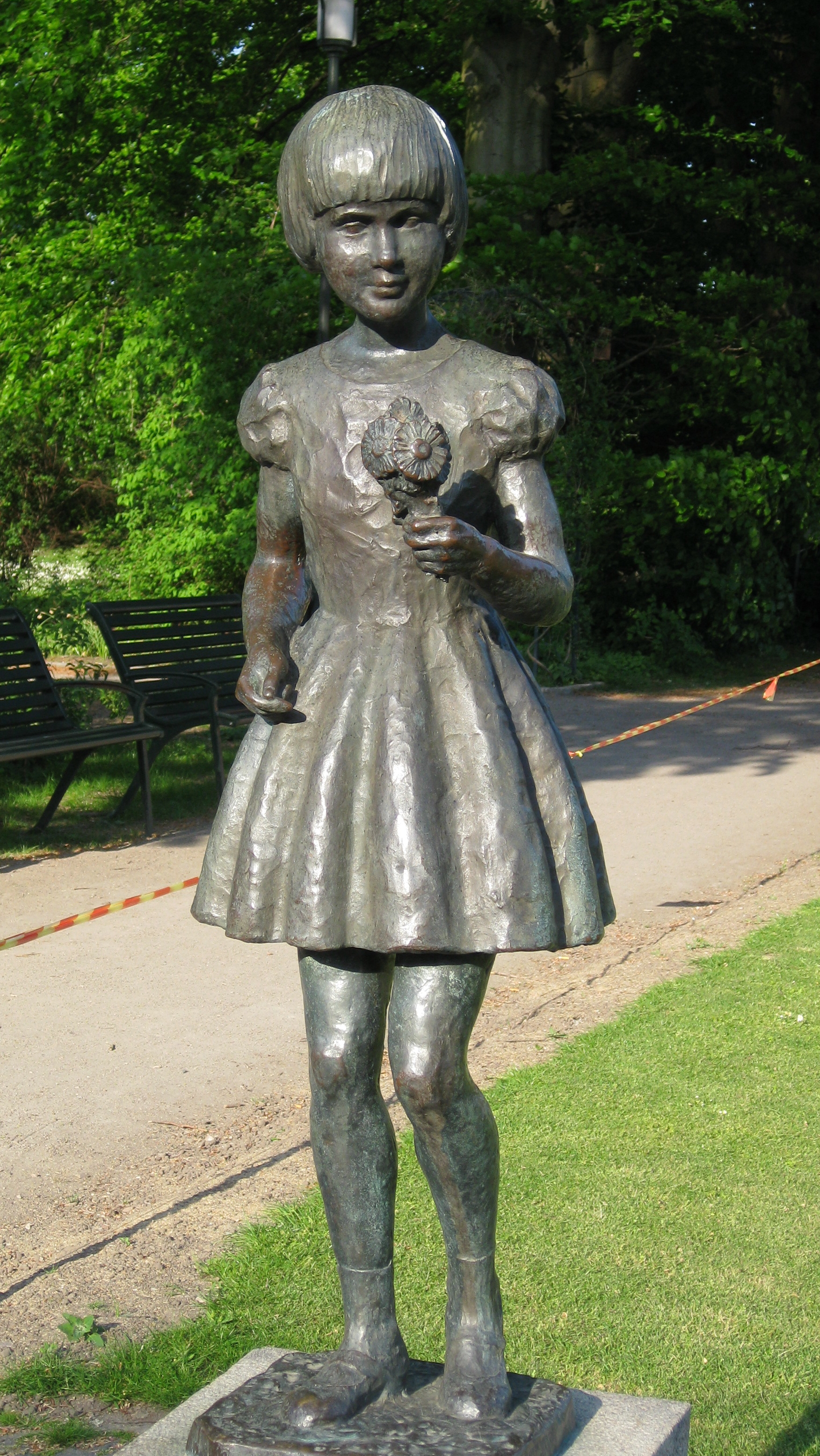 Skulpturen Margaretaflickan i Pildammsparken